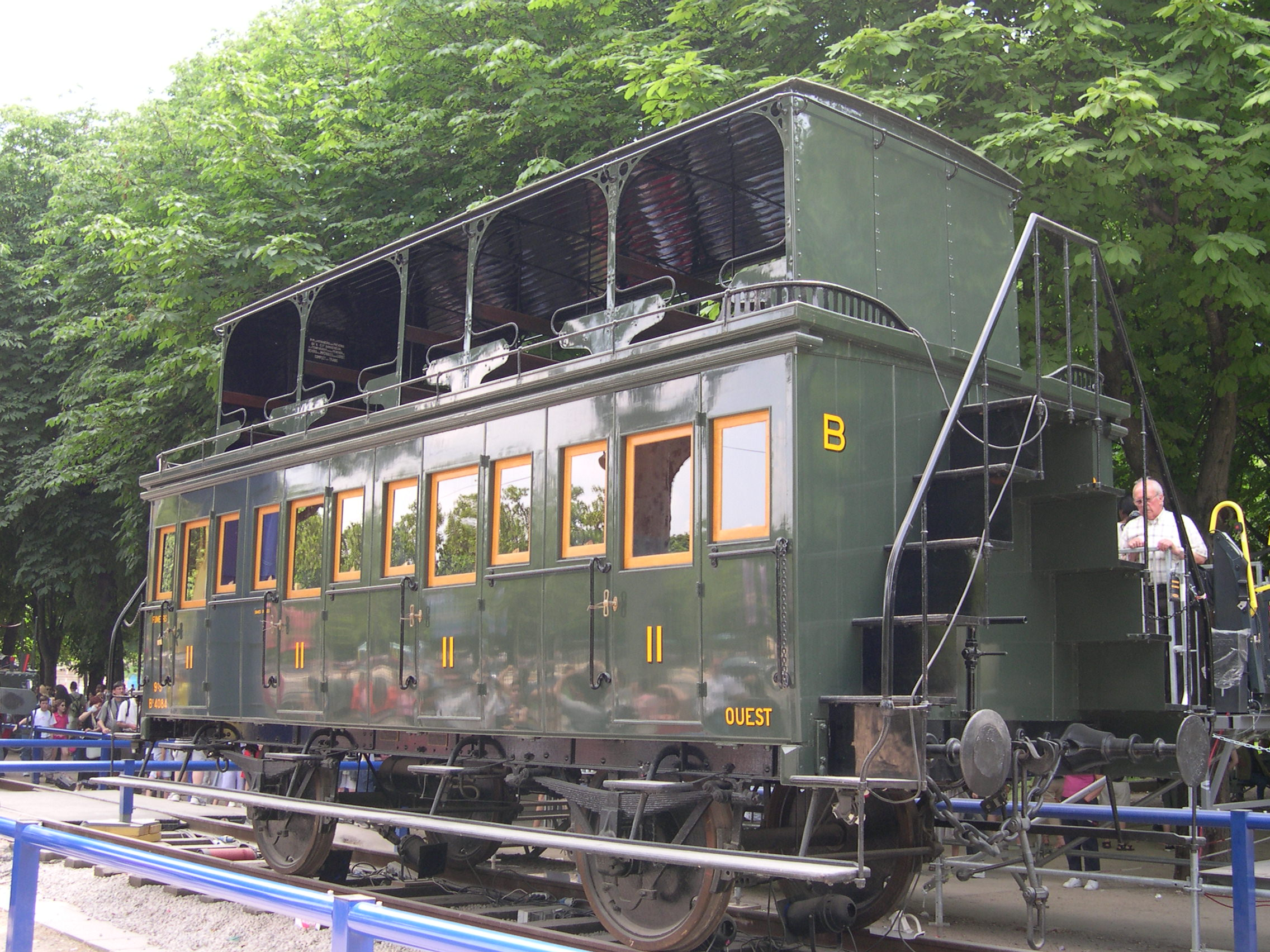 France Paris Champs Elysées Expo Train capitale 2003 Wagon à imperial Auteur : GIRAUD Patrick